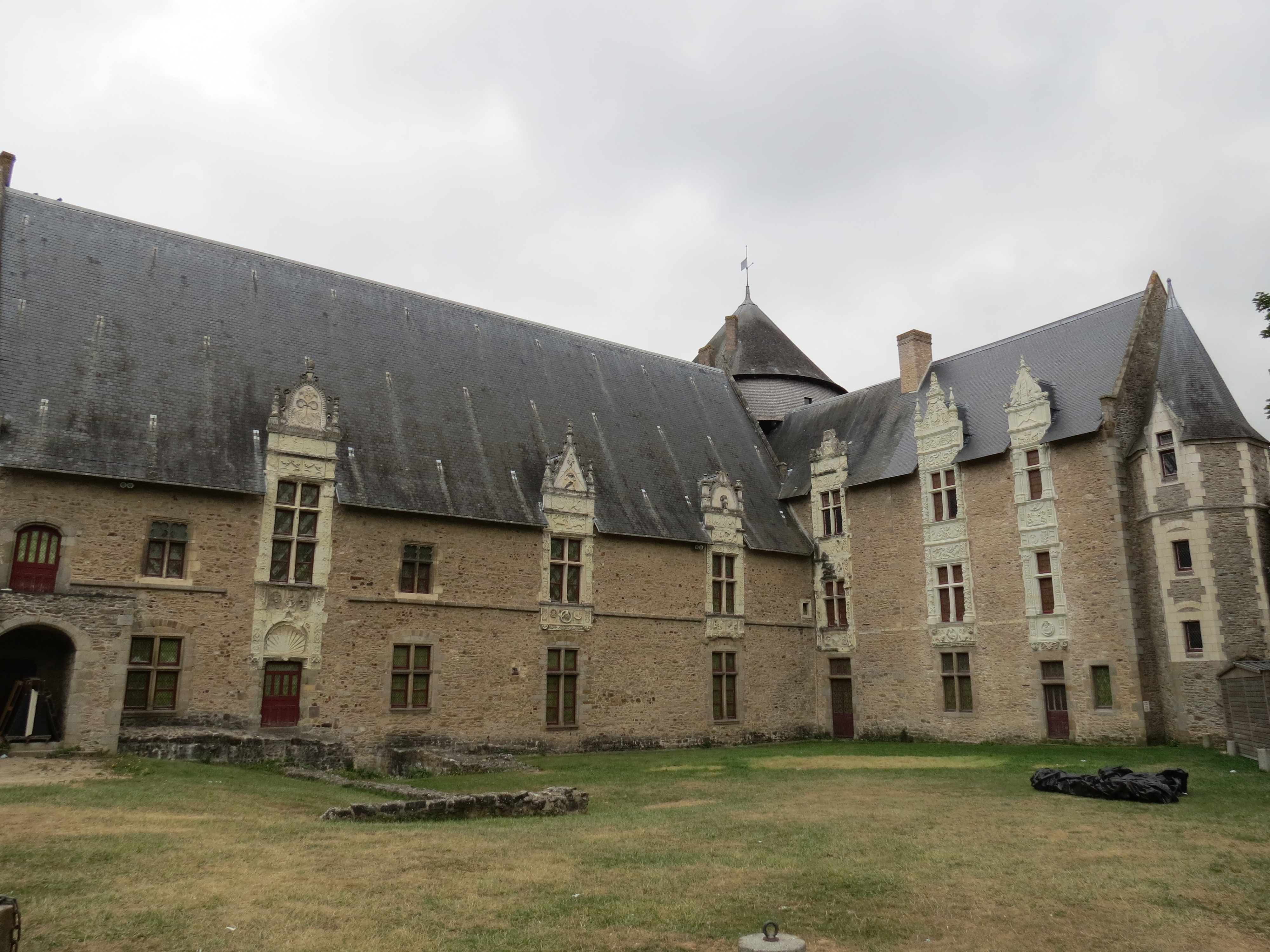 Château, Laval, Mayenne, Pays de la Loire.